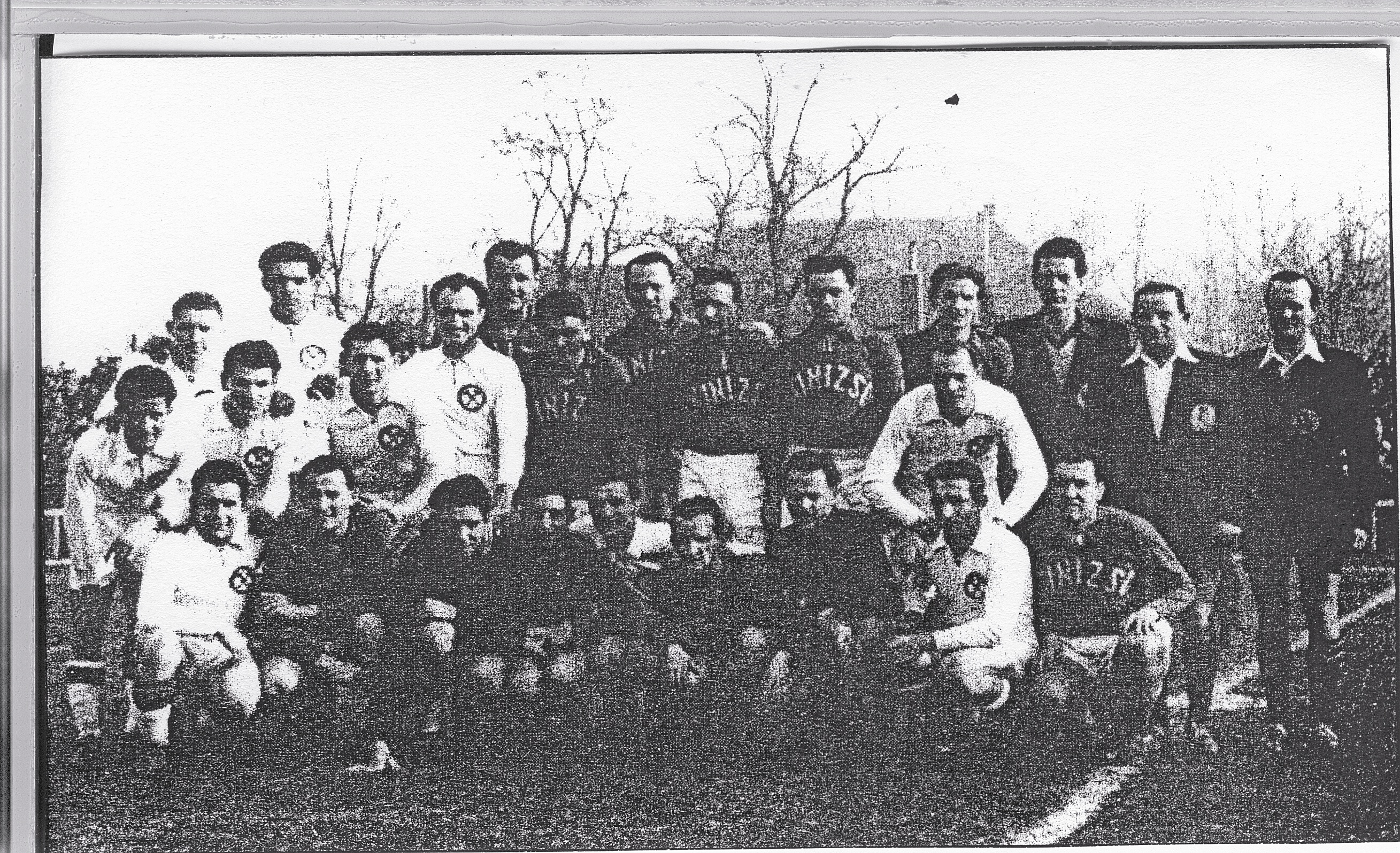 Dorog - FTC 5:0.